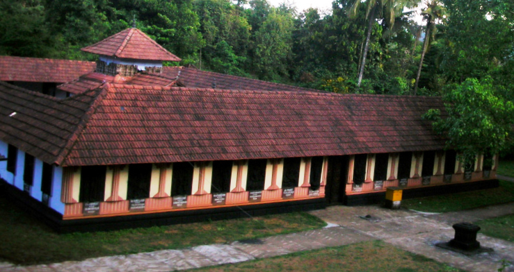 തൃശ്ശിലേരി ക്ഷേത്രം